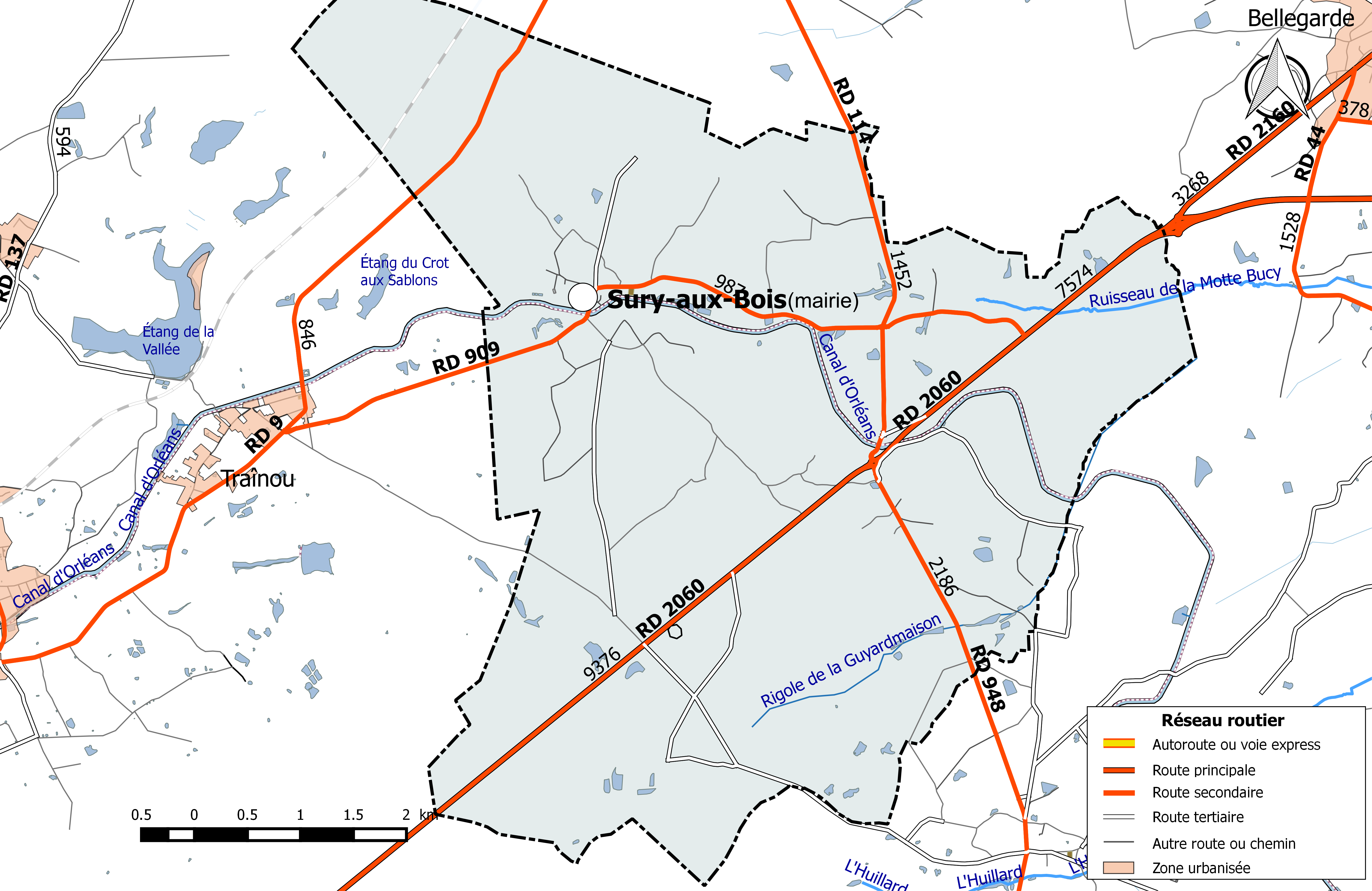 Carte du réseau routier de la commune de Sury-aux-Bois.